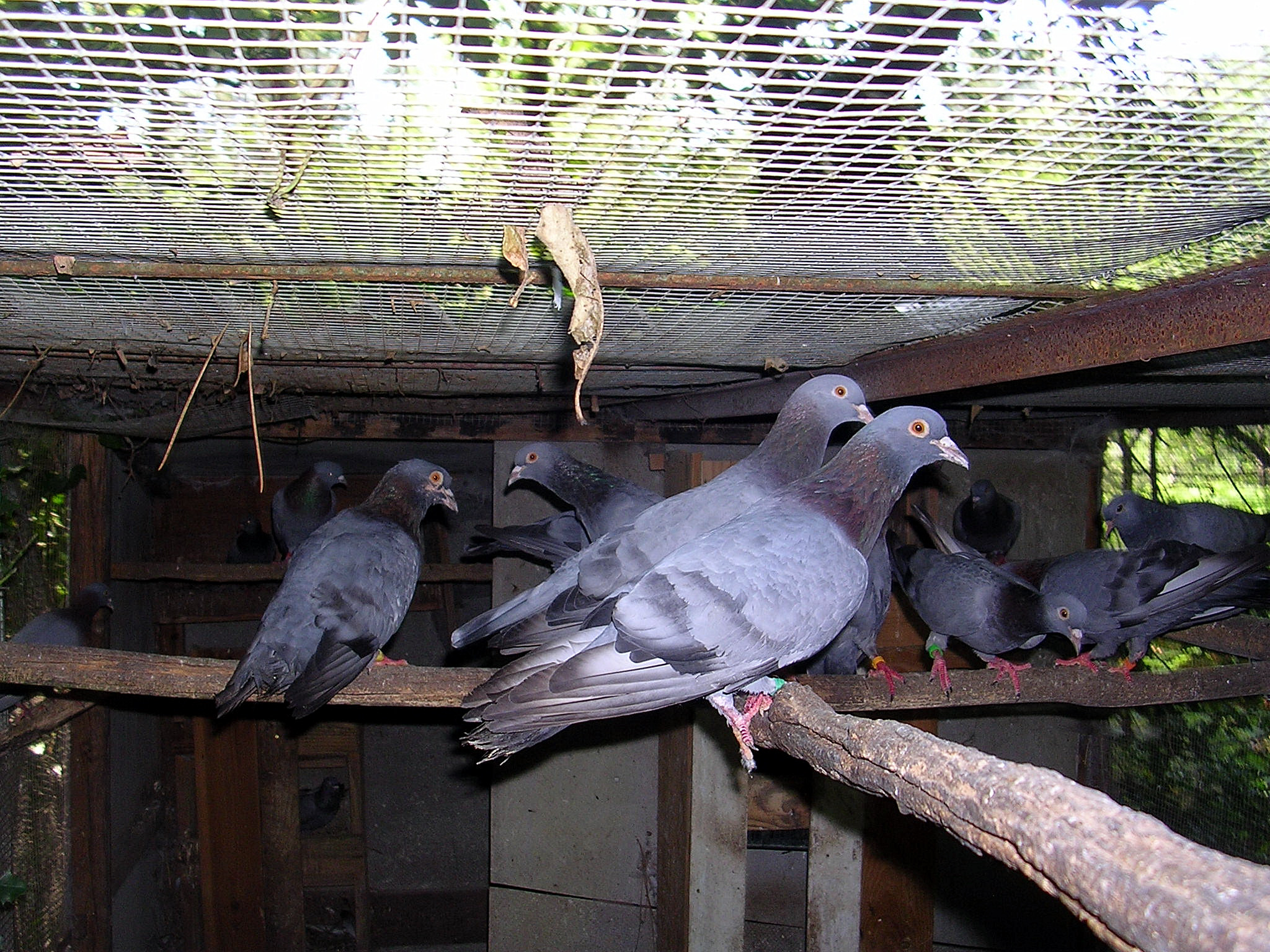 Palombière dans les Landes (France), pigeons en captivité destinés à servir d'appeau. Cette palombière et la forêt ont été entièrement détruites au passage de la tempête Klaus, le 24 janvier 2009.